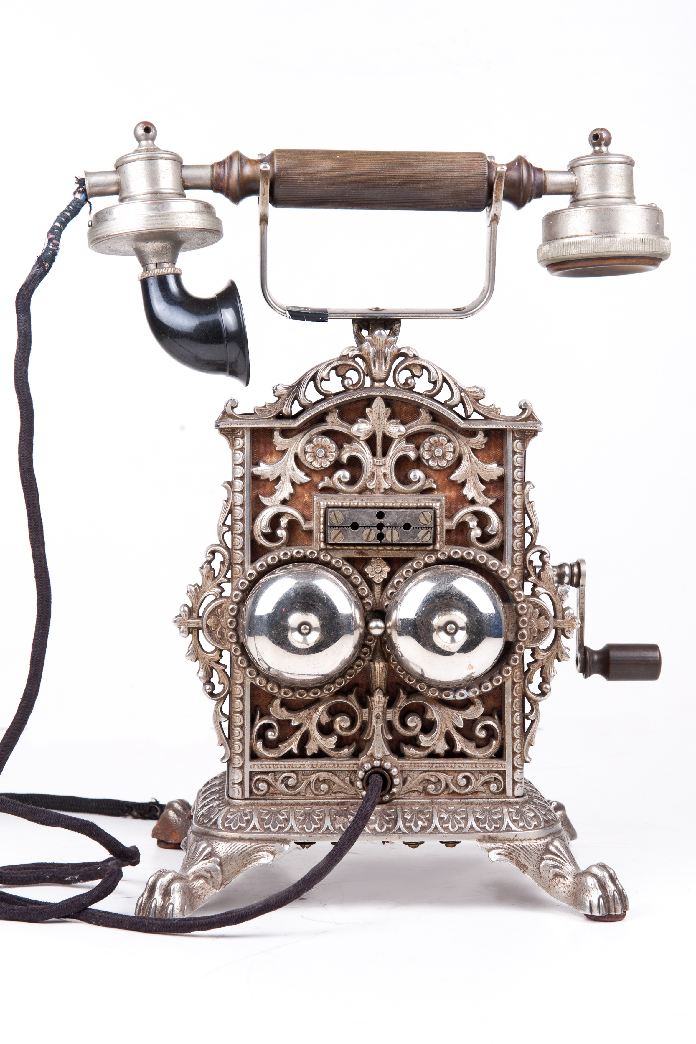 Экспонаты Музея истории телефона The exhibits of the Museum of Telephone History